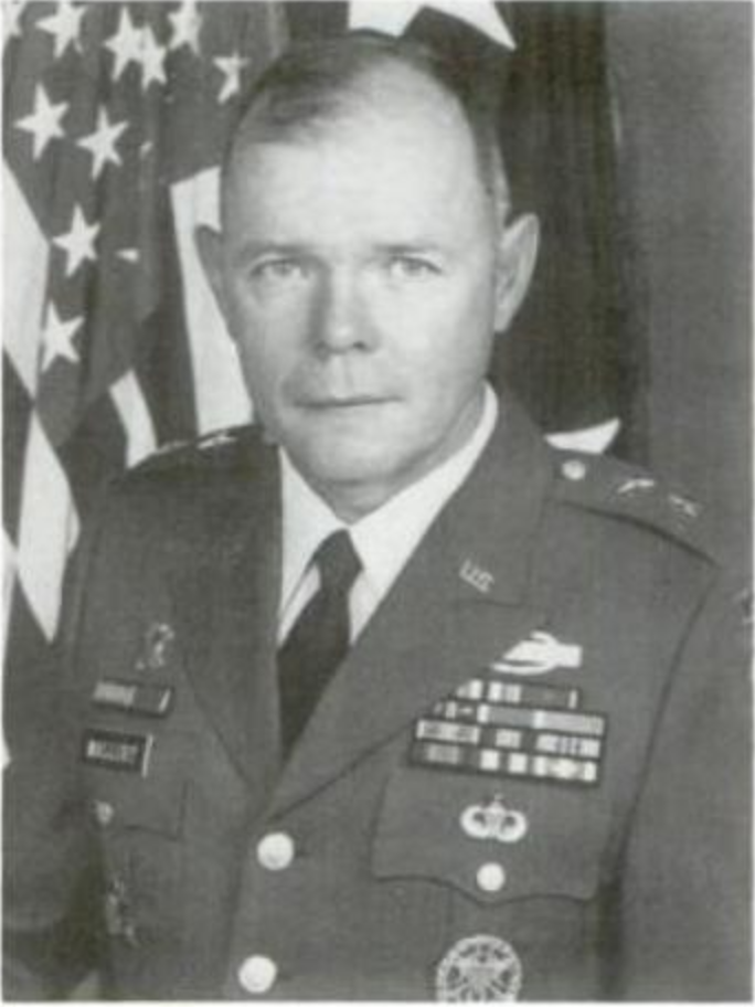 MGen Glynn Mallory, US Army